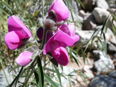 Collaea argentina o Flor de Niño Obtenida en Villa Elena, Cortaderas, San Luis, Argentina